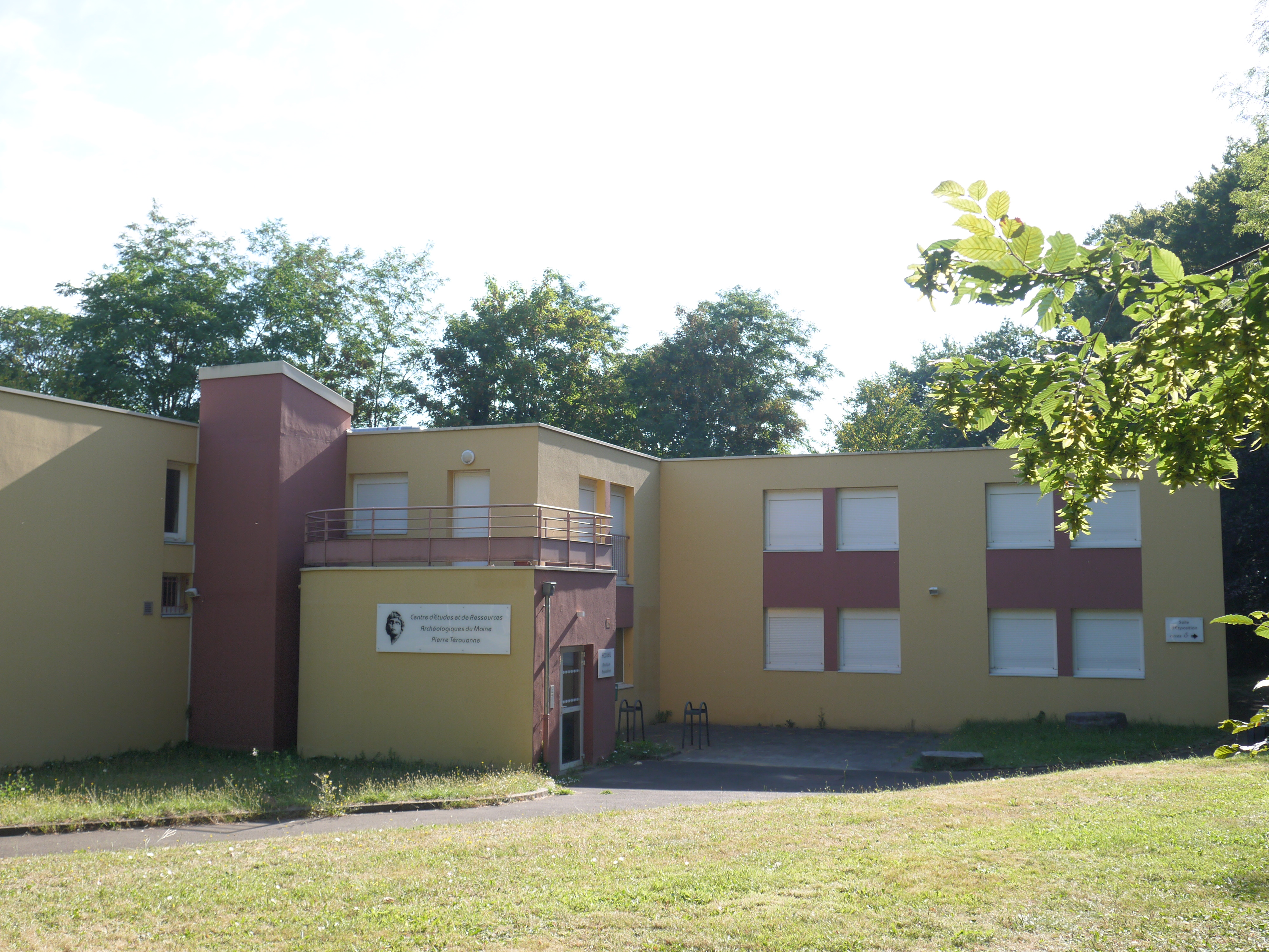 Bâtiment Pierre-Térouanne (fermé lors de la visite du 6 août 2018).